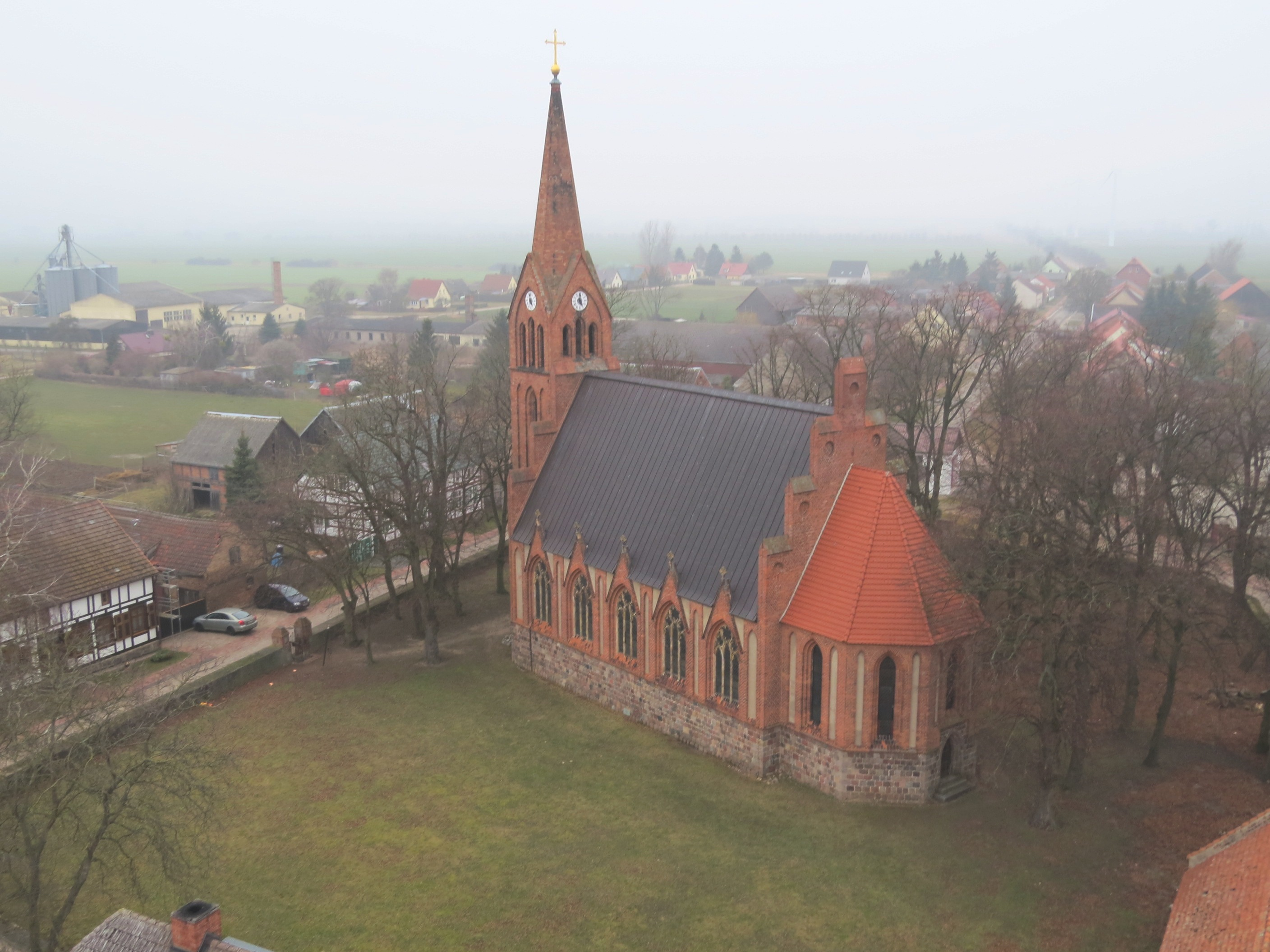 Bergholz, Germany